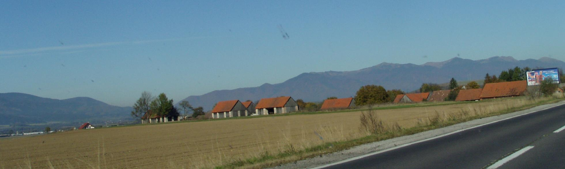 Turčianska kotlina pri Karlovej